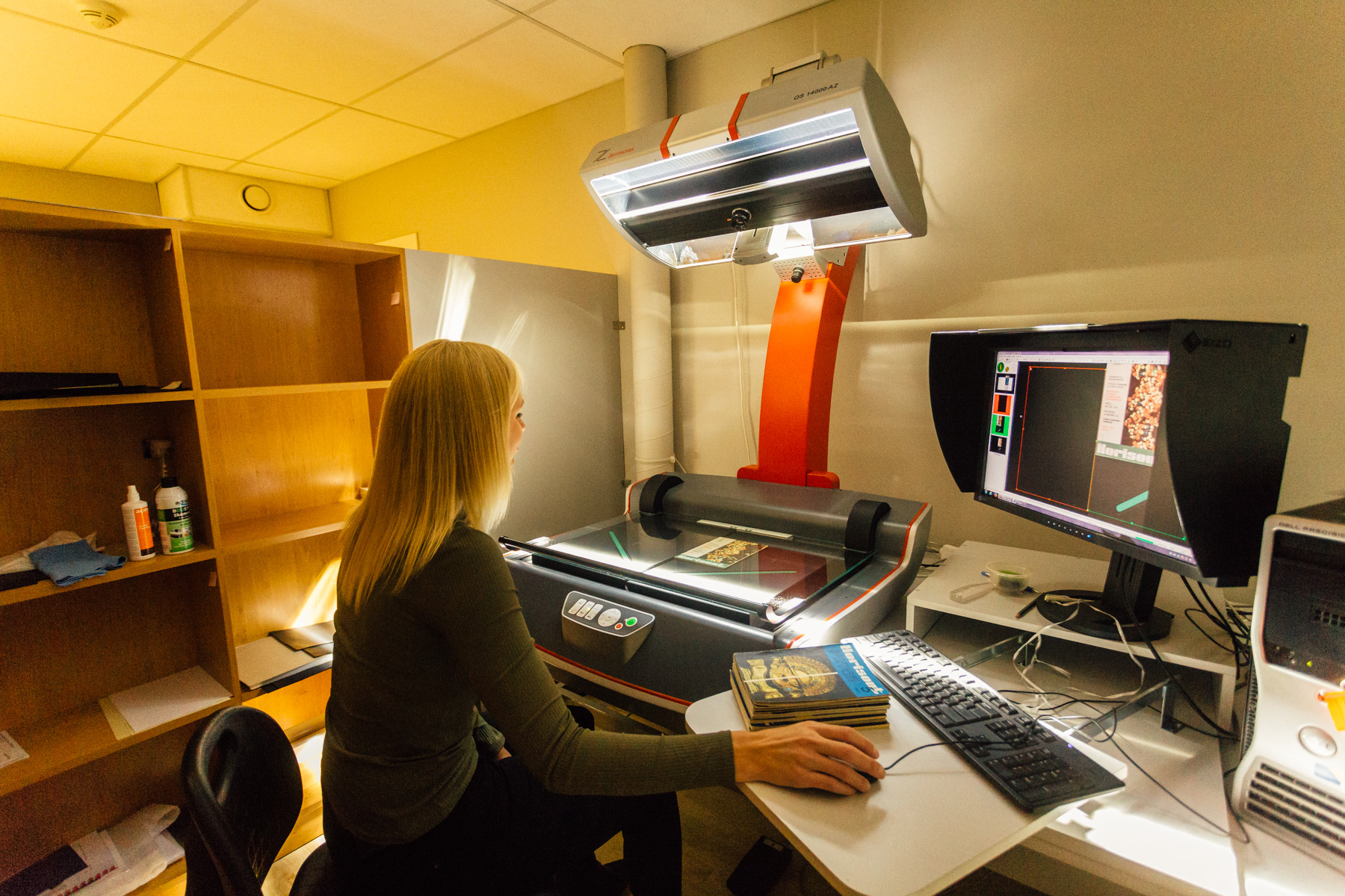 Rahvusraamatukogu digiteerimiskeskuse digiteerija Eva Püvi digiteerib Zeutscheli raamatuskanneriga ajakirja Horisont kõige esimest, 1967. aasta jaanuaris ilmunud numbrit. Kõik läbi aja ilmunud digiteeritud Horisondid on arhiveeritud ja huvilistele vabalt kättesaadavad digitaalarhiivis DIGAR (digar.ee).